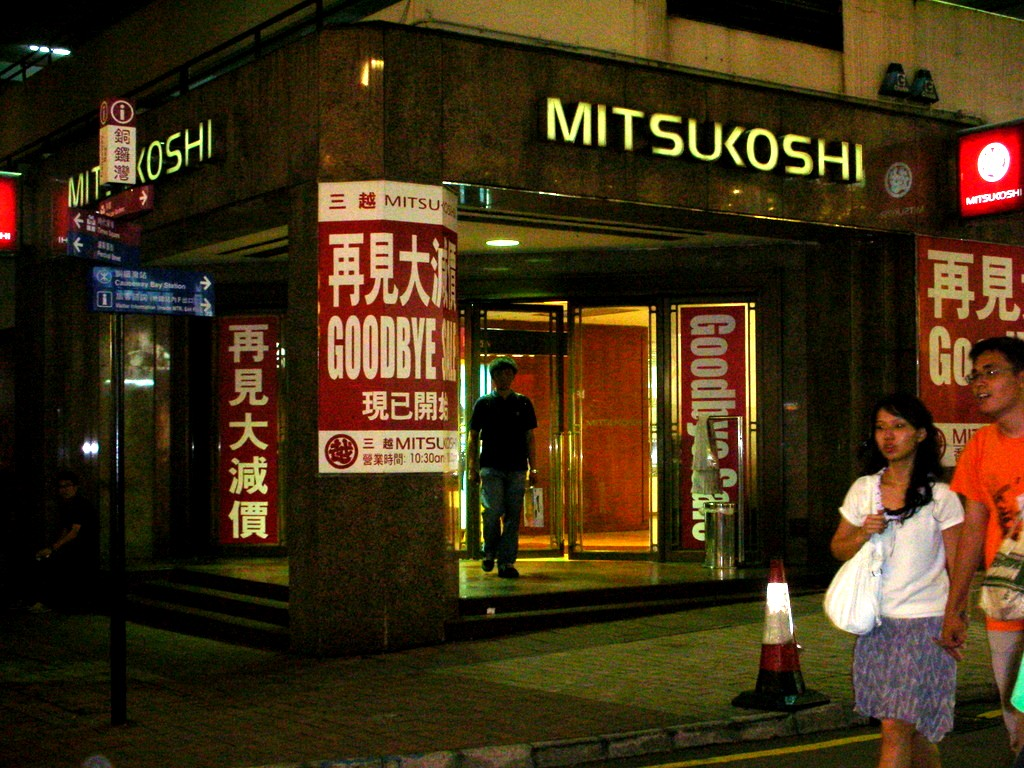 Mitsukoshi Hong Kong, 500 Hennessy Road, Causeway Bay (Close at Aug 2006)